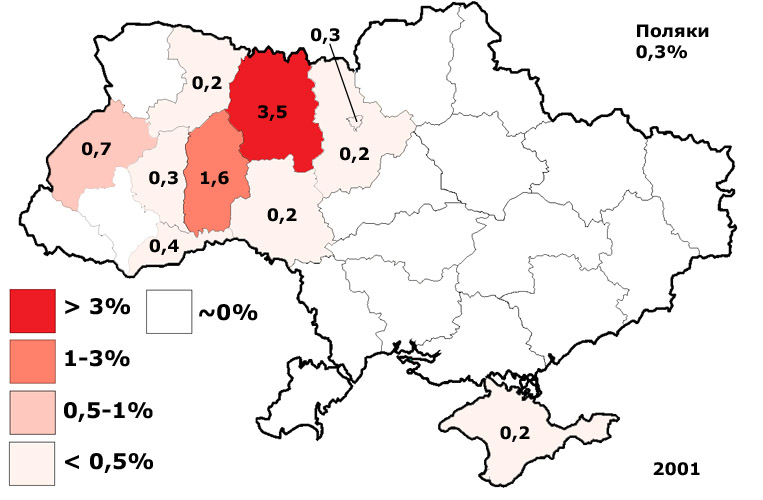 Поляки в Україні 2001: мапа